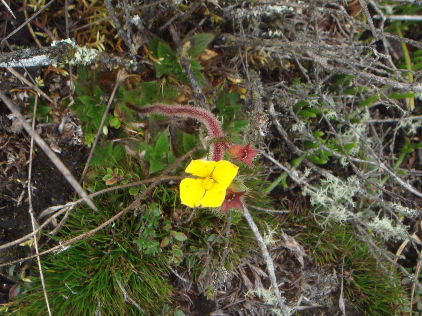 Oreja de oso (Castratella piloselloides) Páramo de Guasca, Cundinamarca, Colombia.